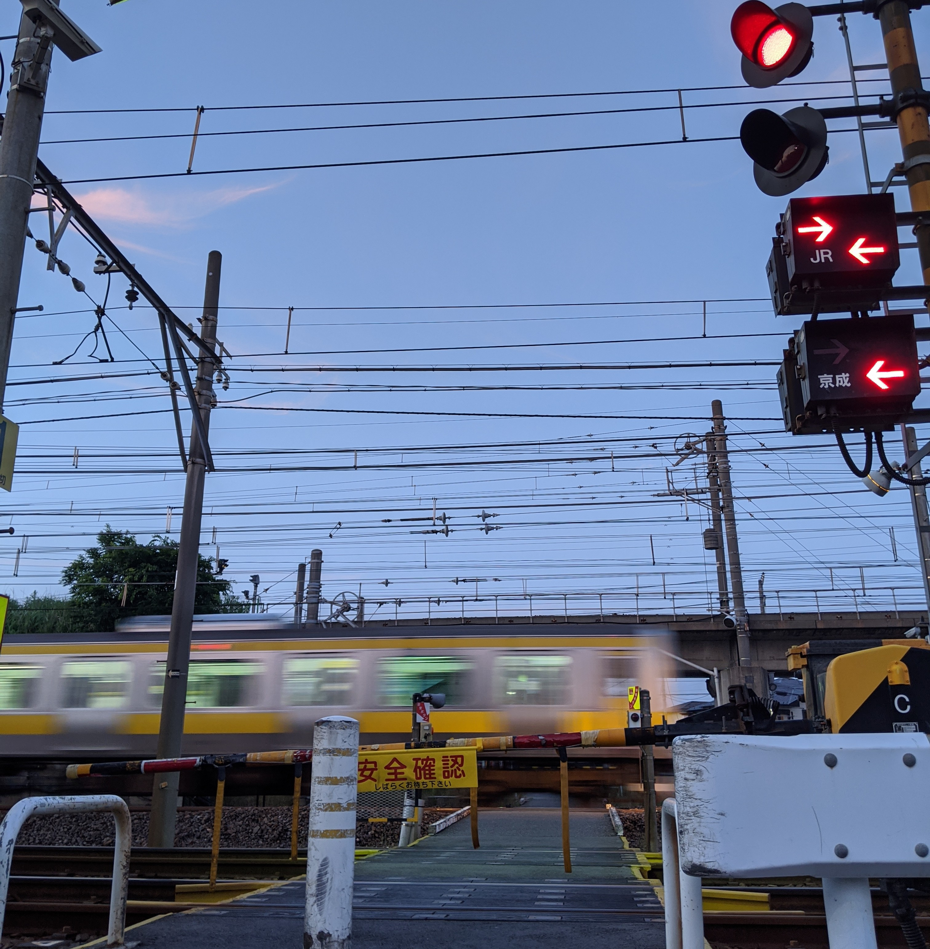 花立踏切を電車が通過する光景。